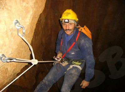 Speleologie